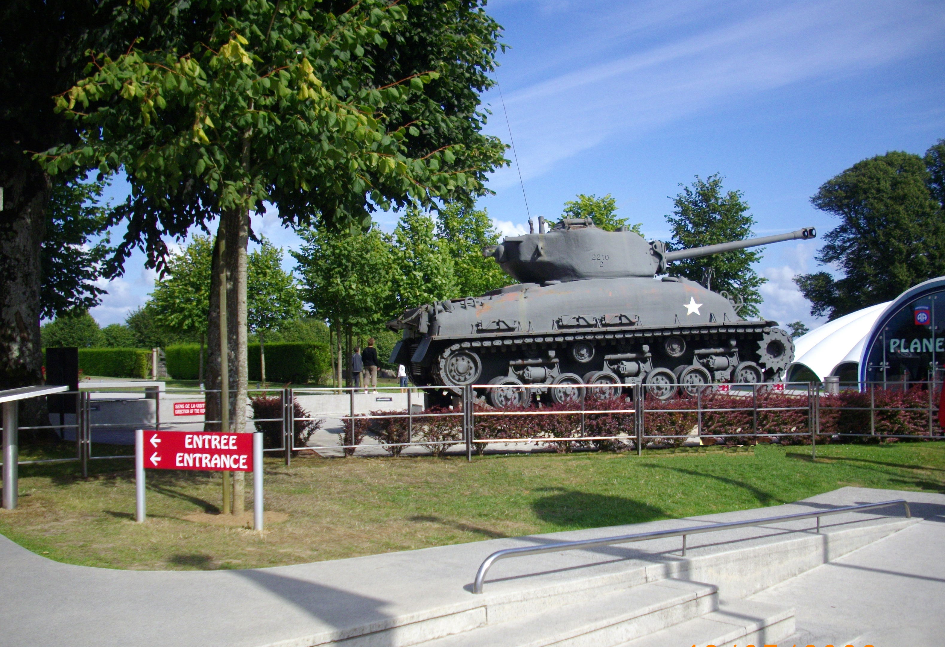 82 Airborne Div. Museum, Ste Mere Eglise